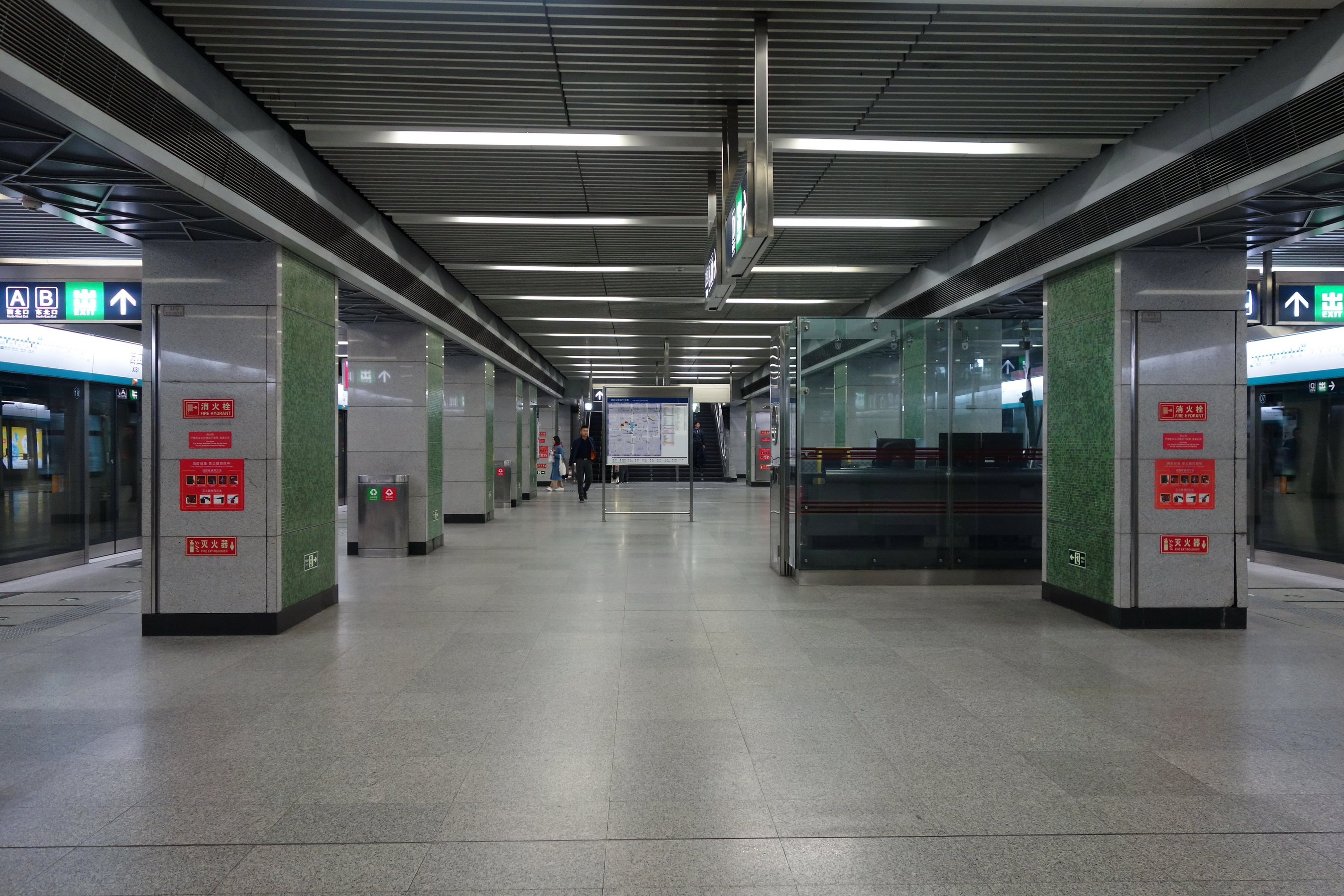 北京地铁4号线西四站岛式站台